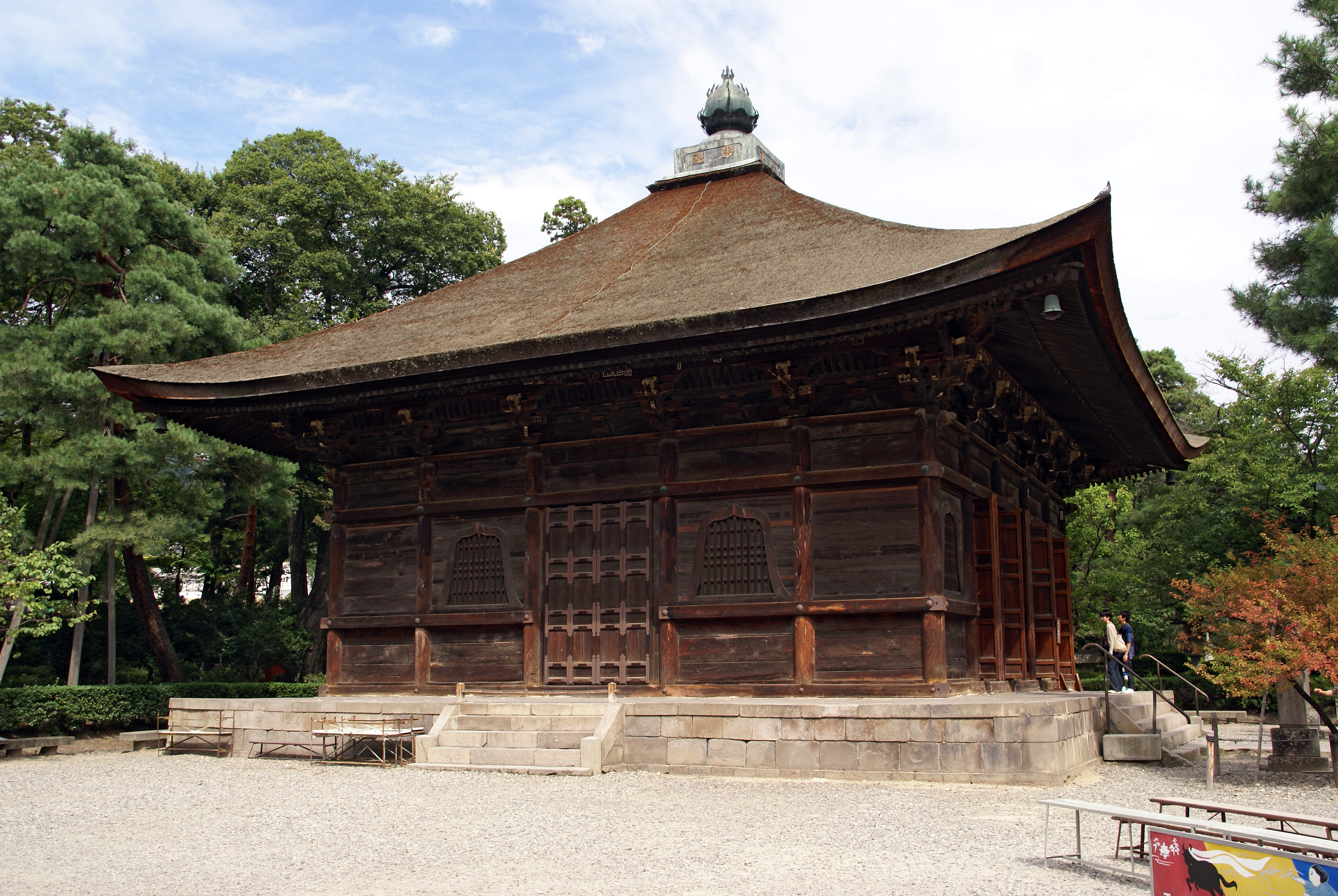 Zenkoji in Nagano, Nagano prefecture, Japan